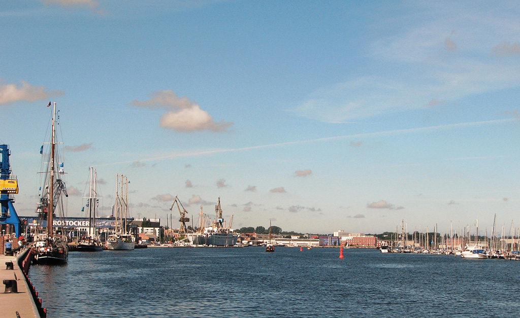 Beschreibung: Stadthafen in Rostock / Bildmitte die Georg Büchner / Germany Fotograf: Darkone, 17. August 2005